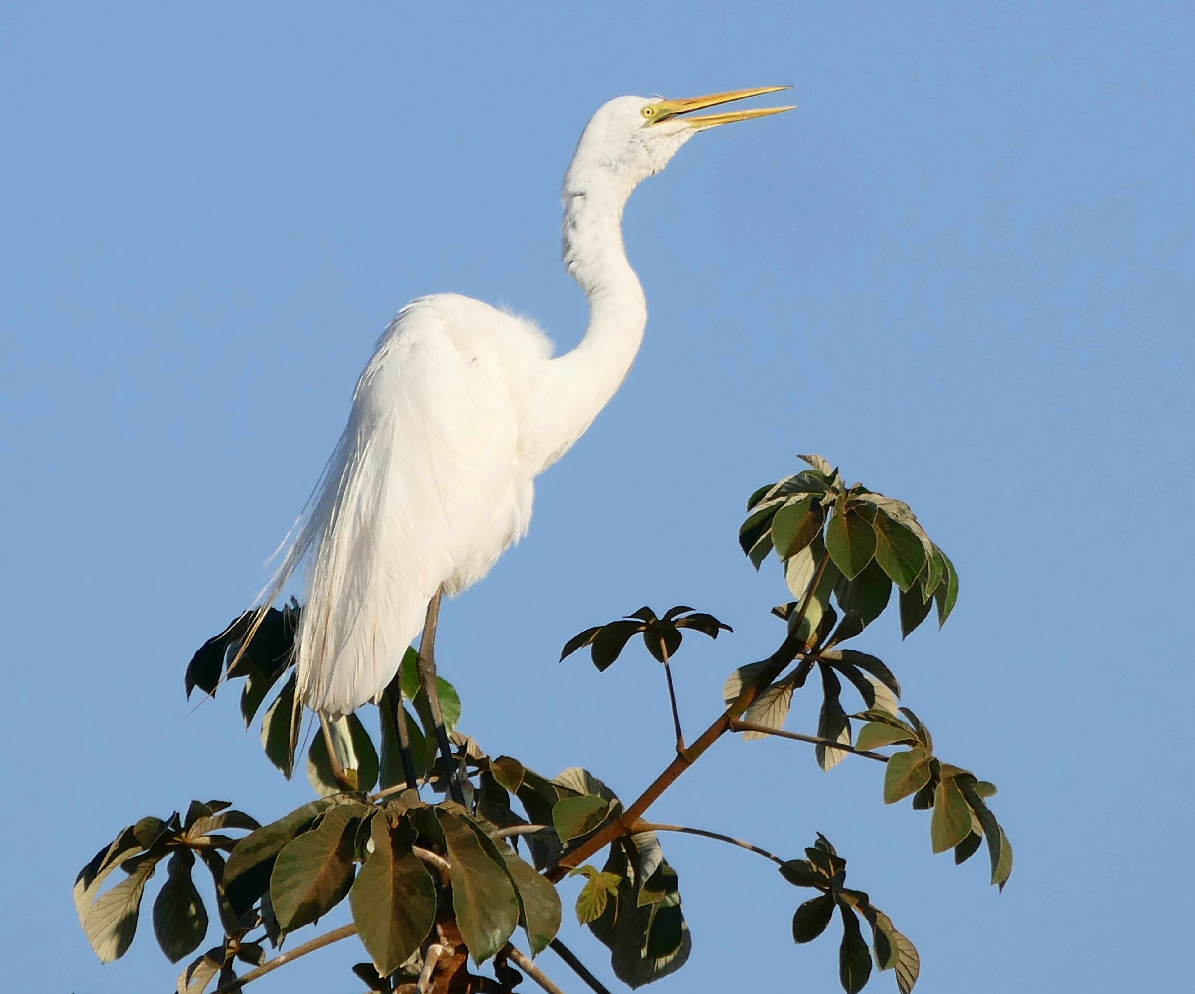 Transpantaneira, Poconé, Mato Grosso, BRAZIL